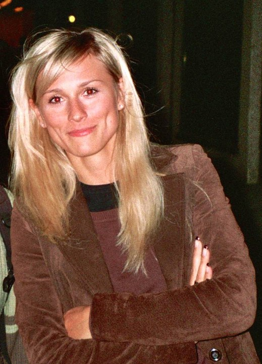 Sylwia Juszczak-Pągowska (ur. 17 czerwca 1977 we Wrocławiu) - polska aktorka.